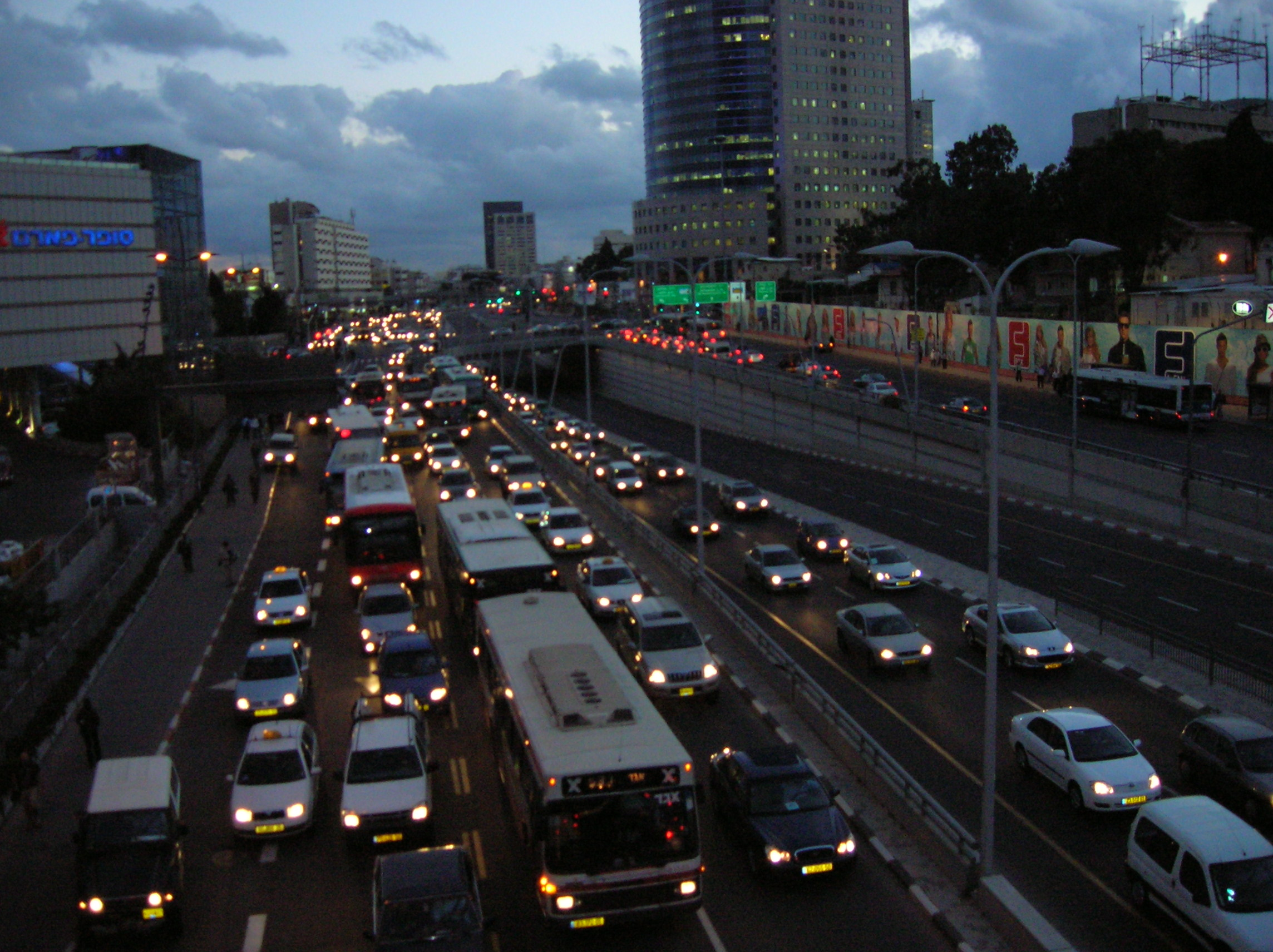 Begin Road, Tel Aviv